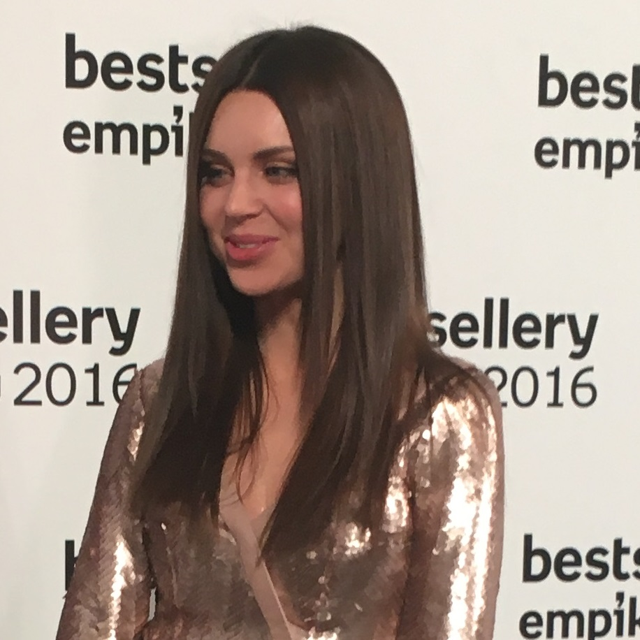 Polska piosenkarka Monika Lewczuk podczas gali "Bestsellery Empiku 2016" w 2017 roku.